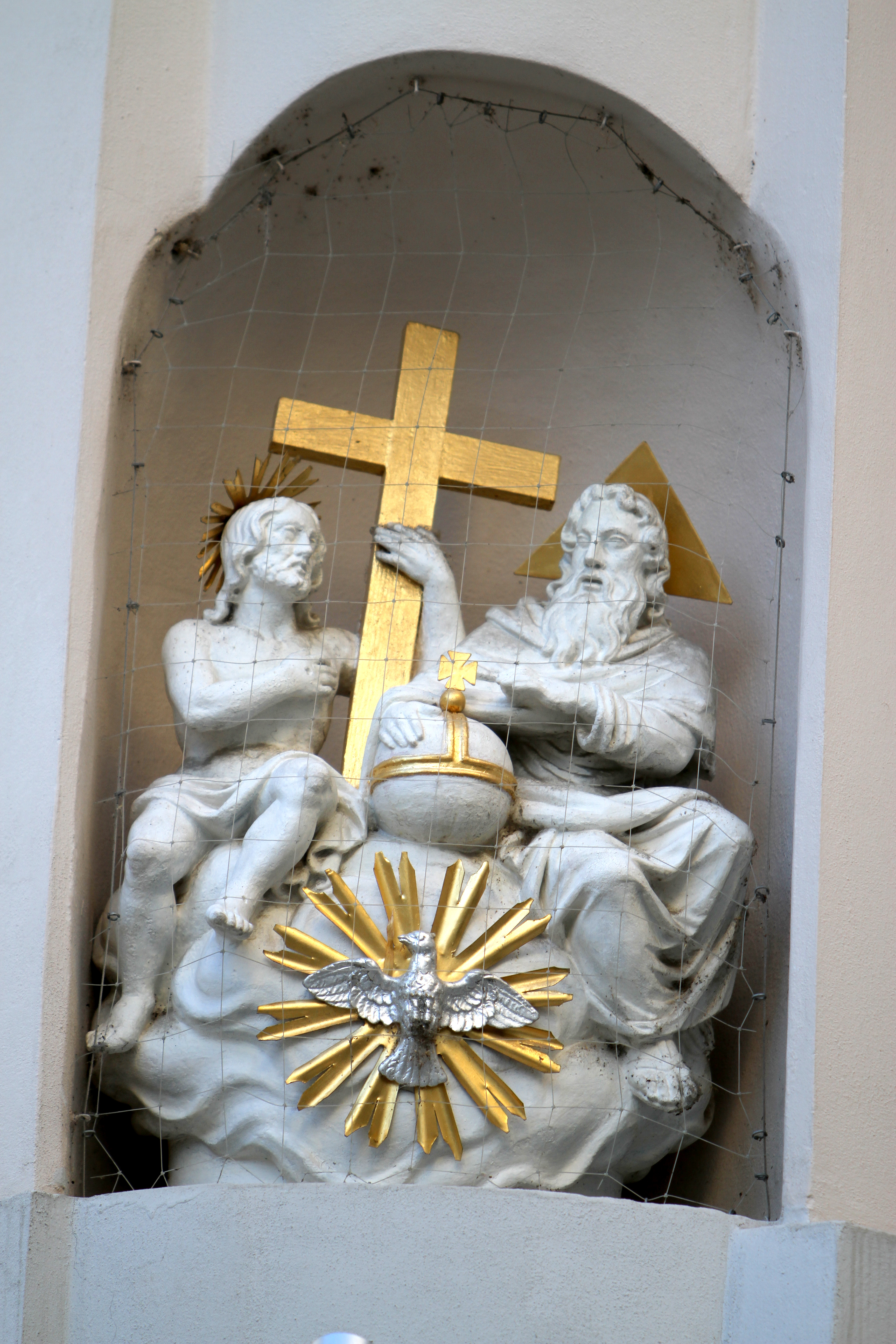 Miethaus, Zur Kleinen Dreifaltigkeit